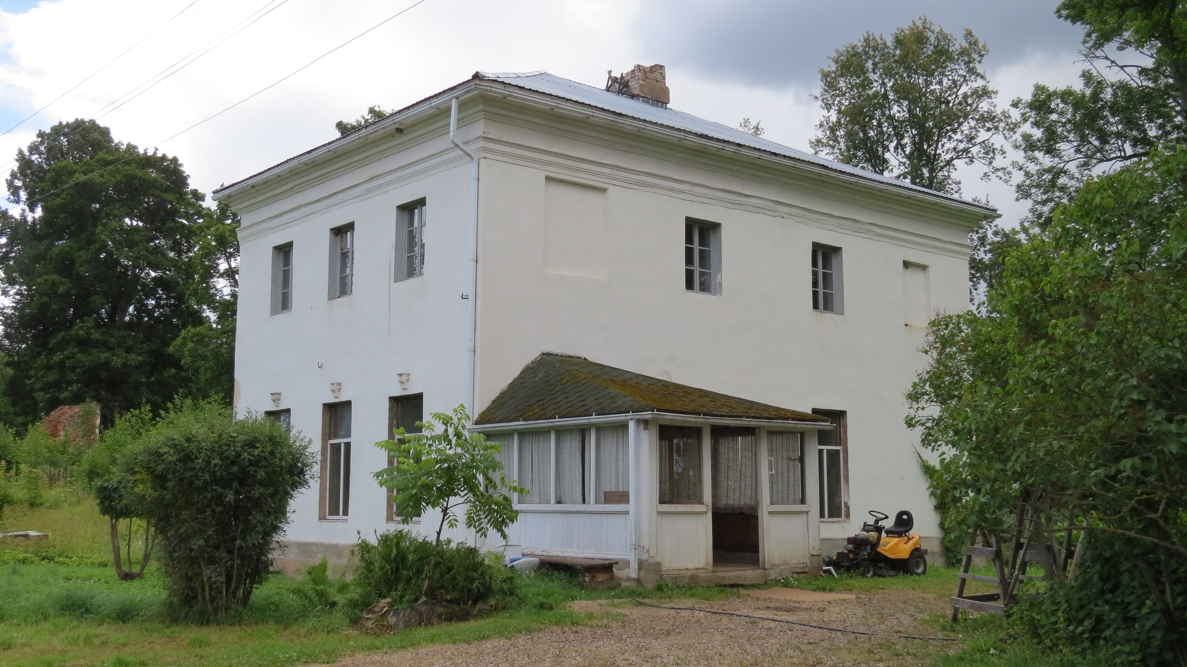 Bauņi mõisa peahoone säilinud osa 2013. aastal.